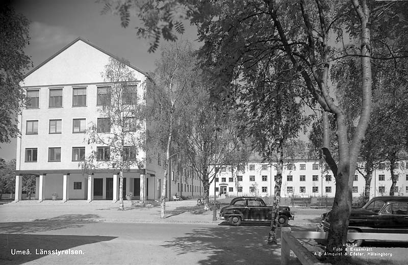 Länsstyrelsen.; Byggnadsverk; Landstatshus/länsstyrelse; Offentlig förvaltning